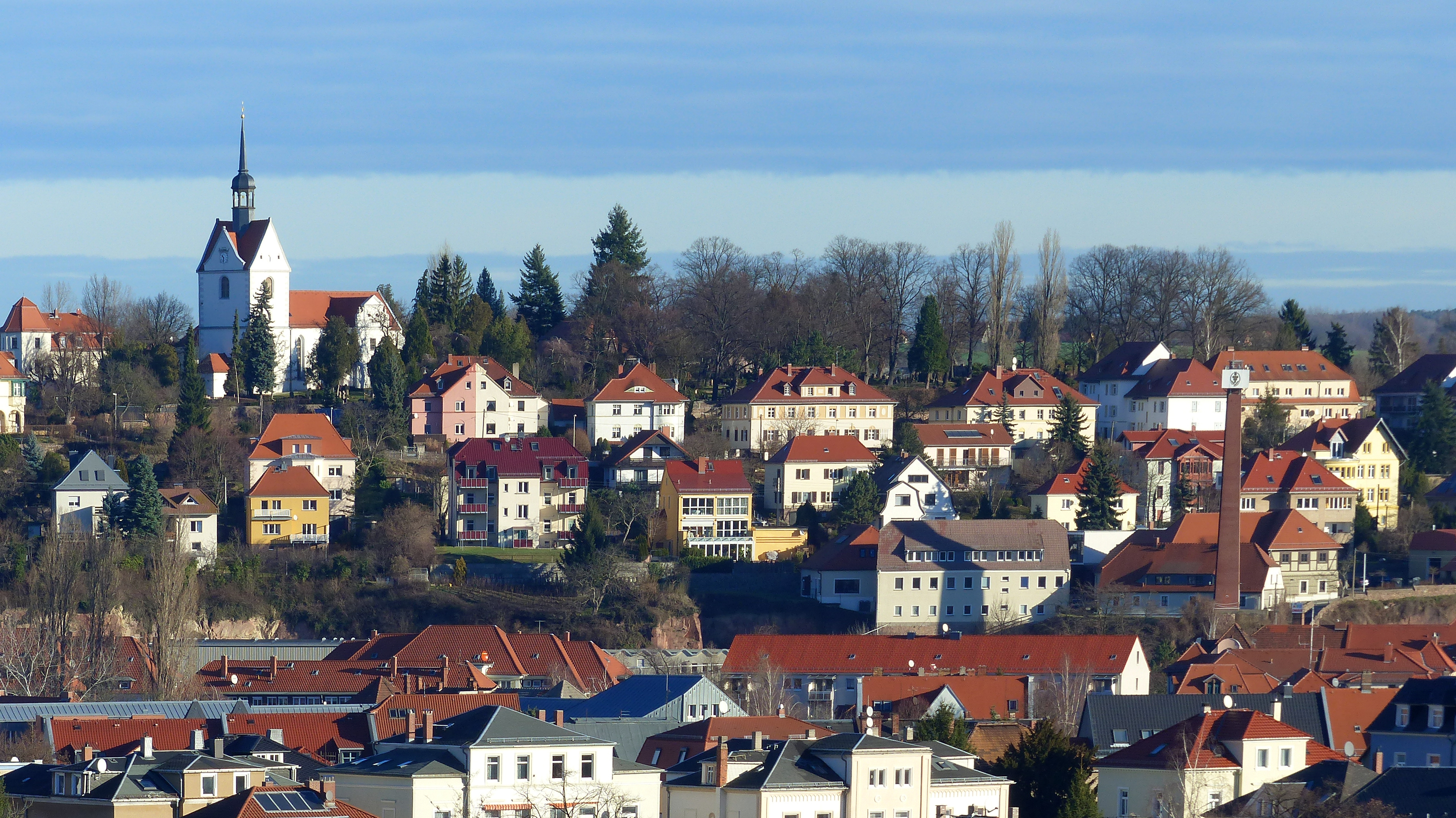 Blick auf Zscheila, Meißen, vom linken Elbufer aus gesehen